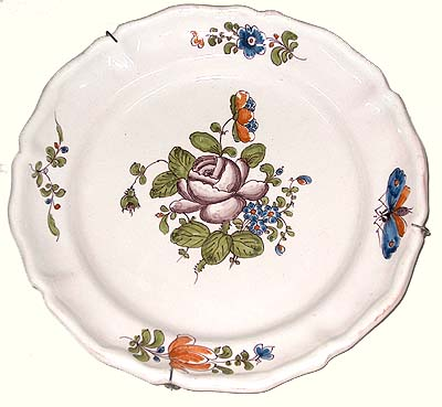 Assiette en faïence de Bordeaux